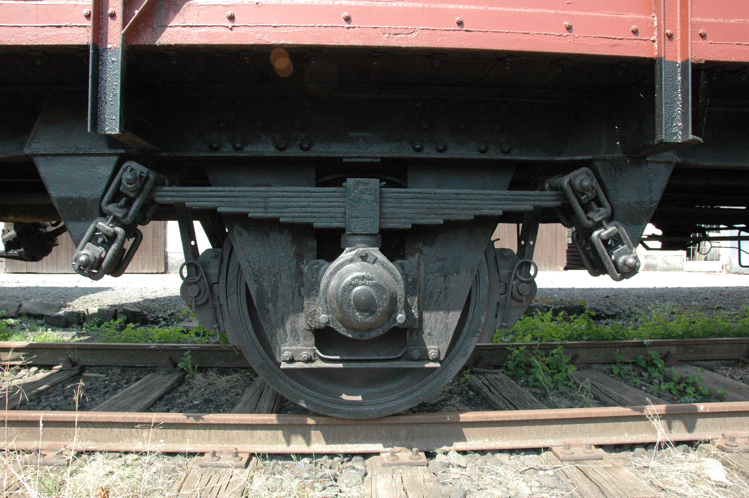 bladveer